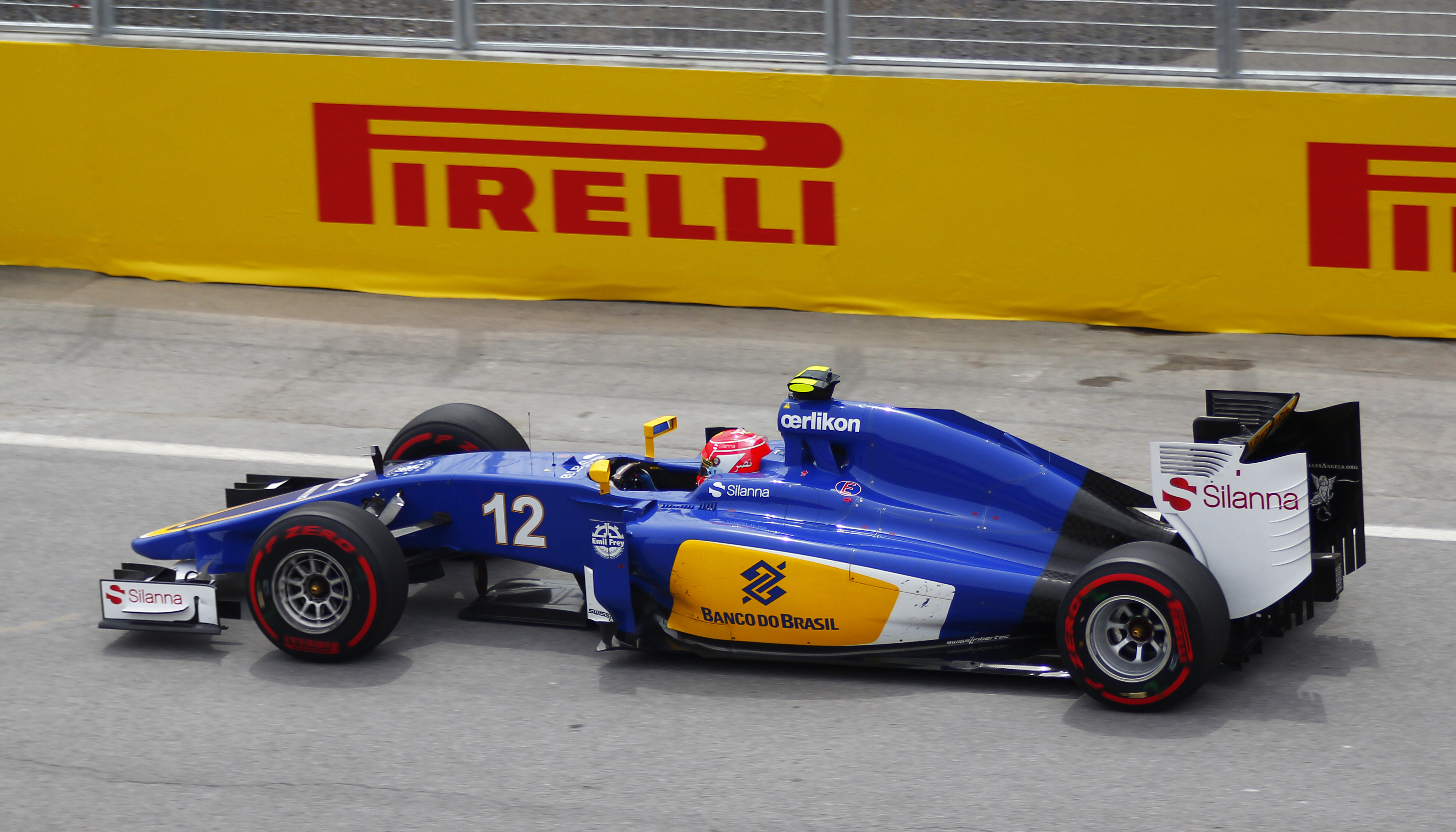 Felipe Nasr - Sauber - Grand Prix du Canada - Circuit Gilles-Villeneuve - 7 juin 2015 (Photo Paul-Émile Poulin-Jacques)